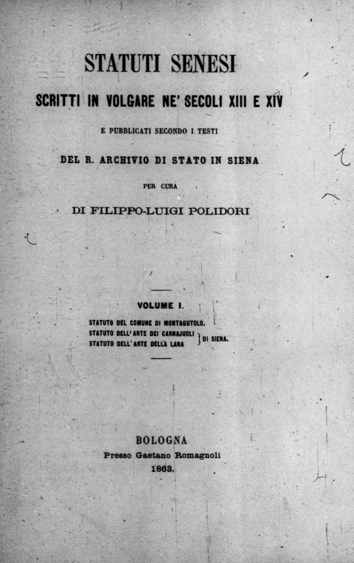 Frontespizio